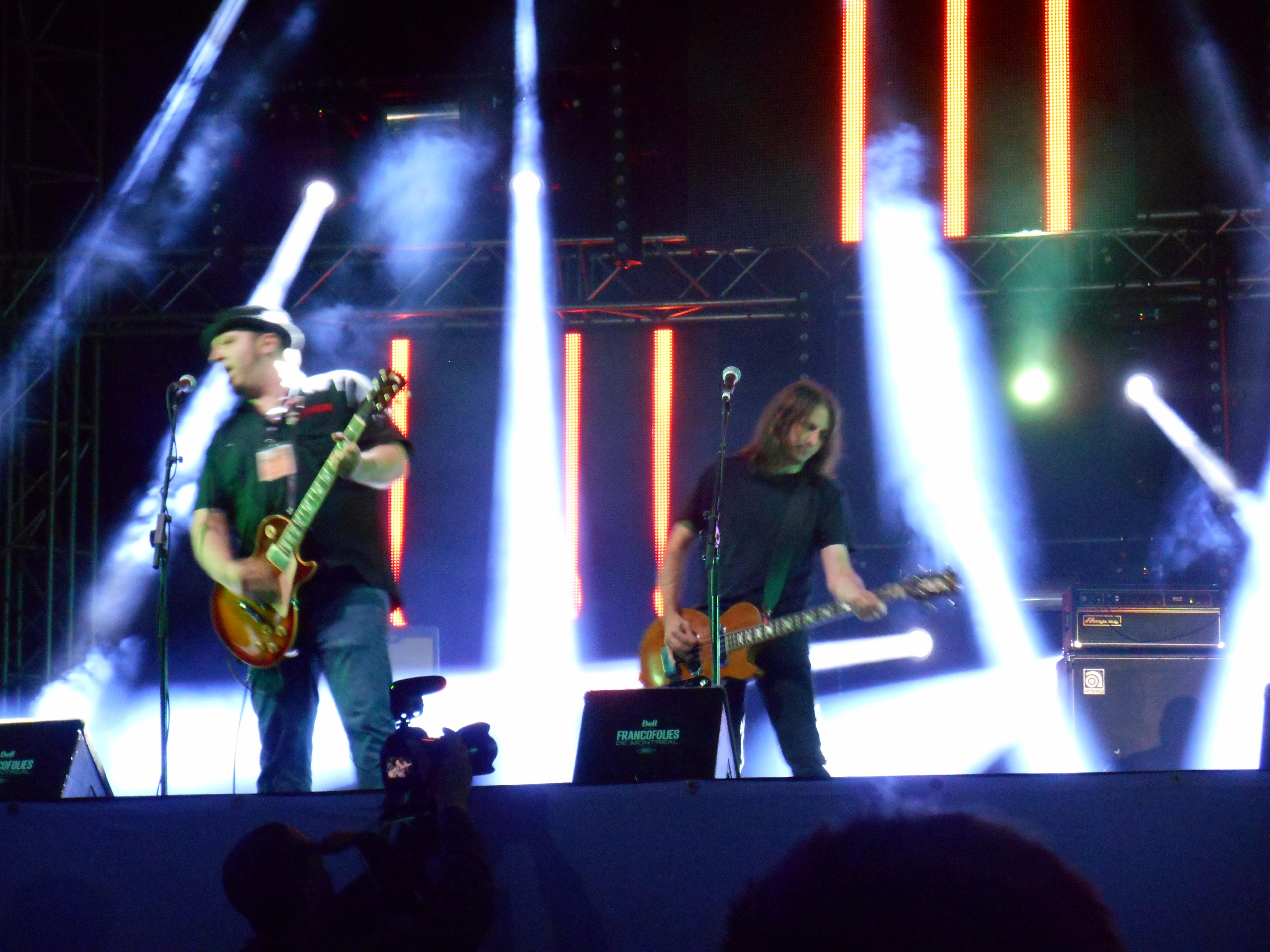 Le groupe Vilain Pingouin a offert une performance aux FrancoFolies de Montréal, le 13 juin 2014, à la place des Festivals.